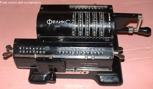 Арифмометр «Феликс», завод Счётмаш (г. Курск).